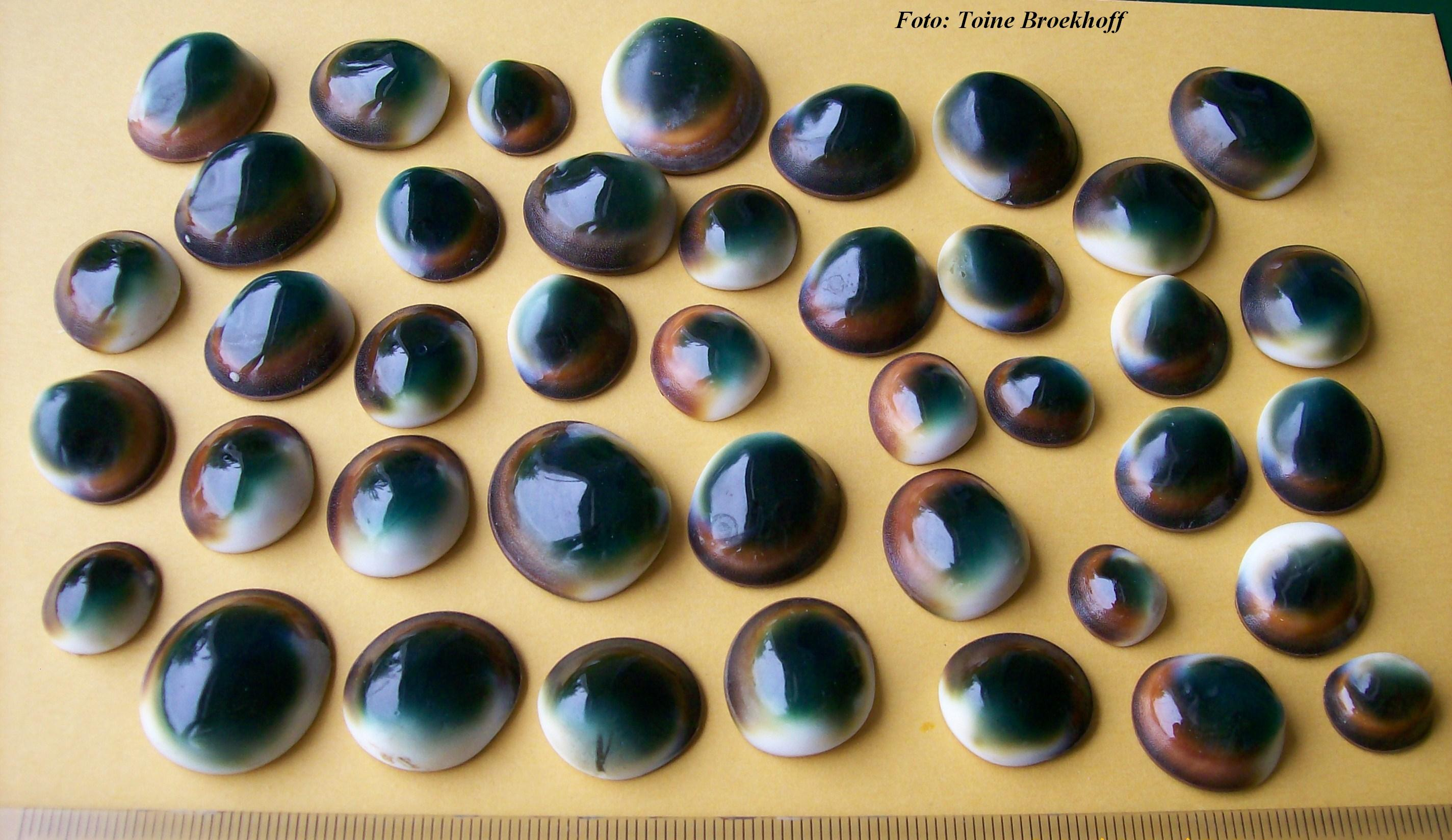 Mata Biak. Sluitschijfjes of plaatjes van Zeeslak uit het voormalig Nederlands Nieuw Guinea, vindplaats Biak 1962.